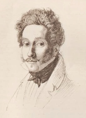 Carl von Mannlich (1787-1832), bayerischer Offizier und Forstmeister